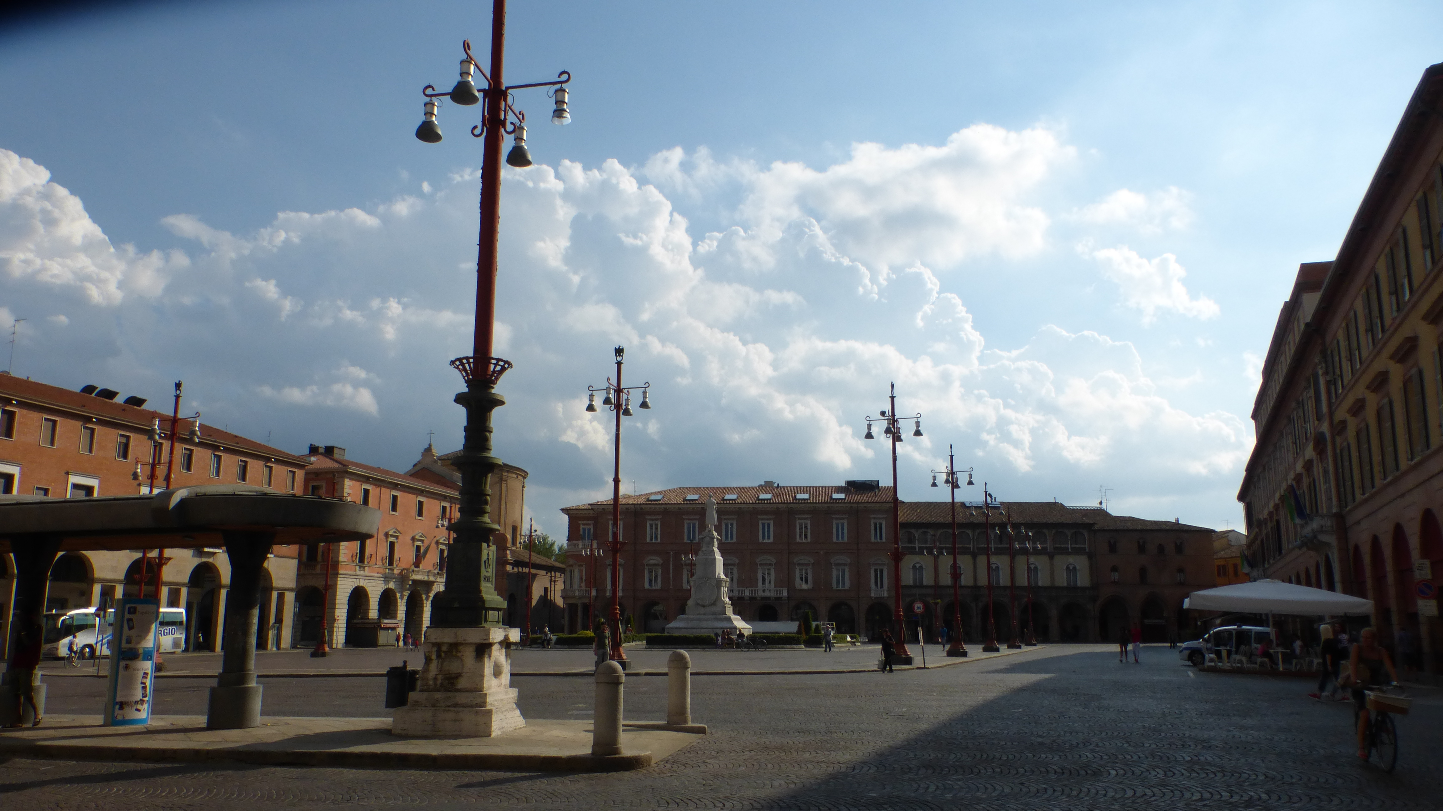 Forlì